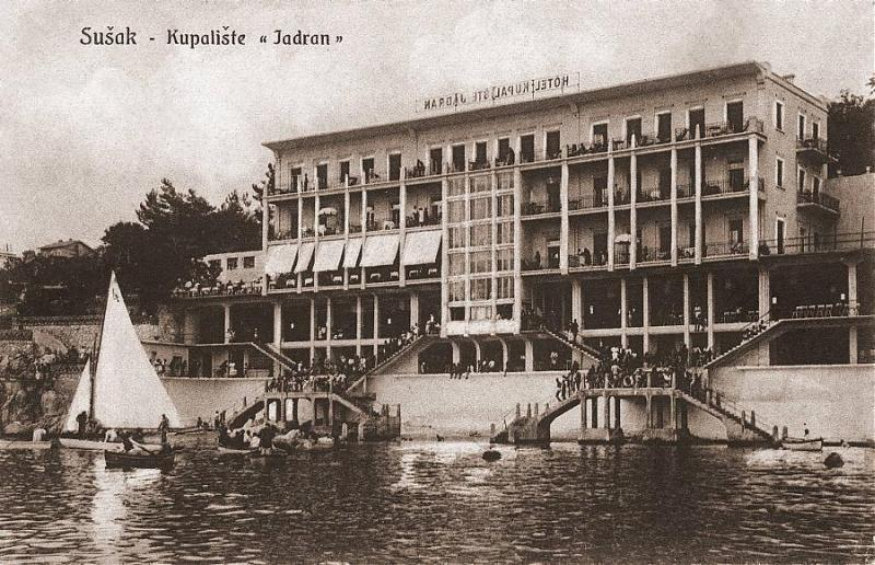 hotel jadran, nekad